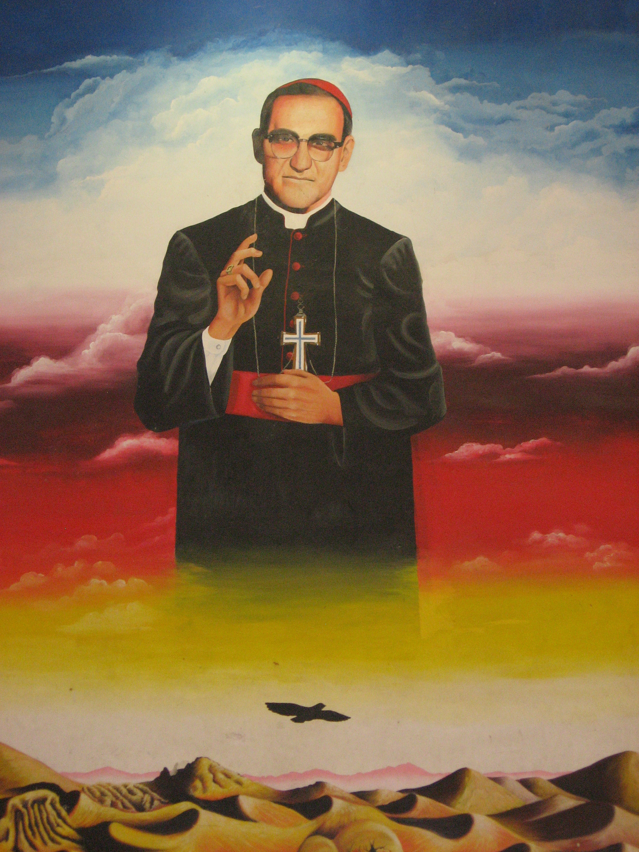 Mural con la imagen de Monseñor Óscar Arnulfo Romero, ubicado en el Edificio Histórico de la Facultad de Jurisprudencia y Ciencias Sociales de la Universidad de El Salvador.